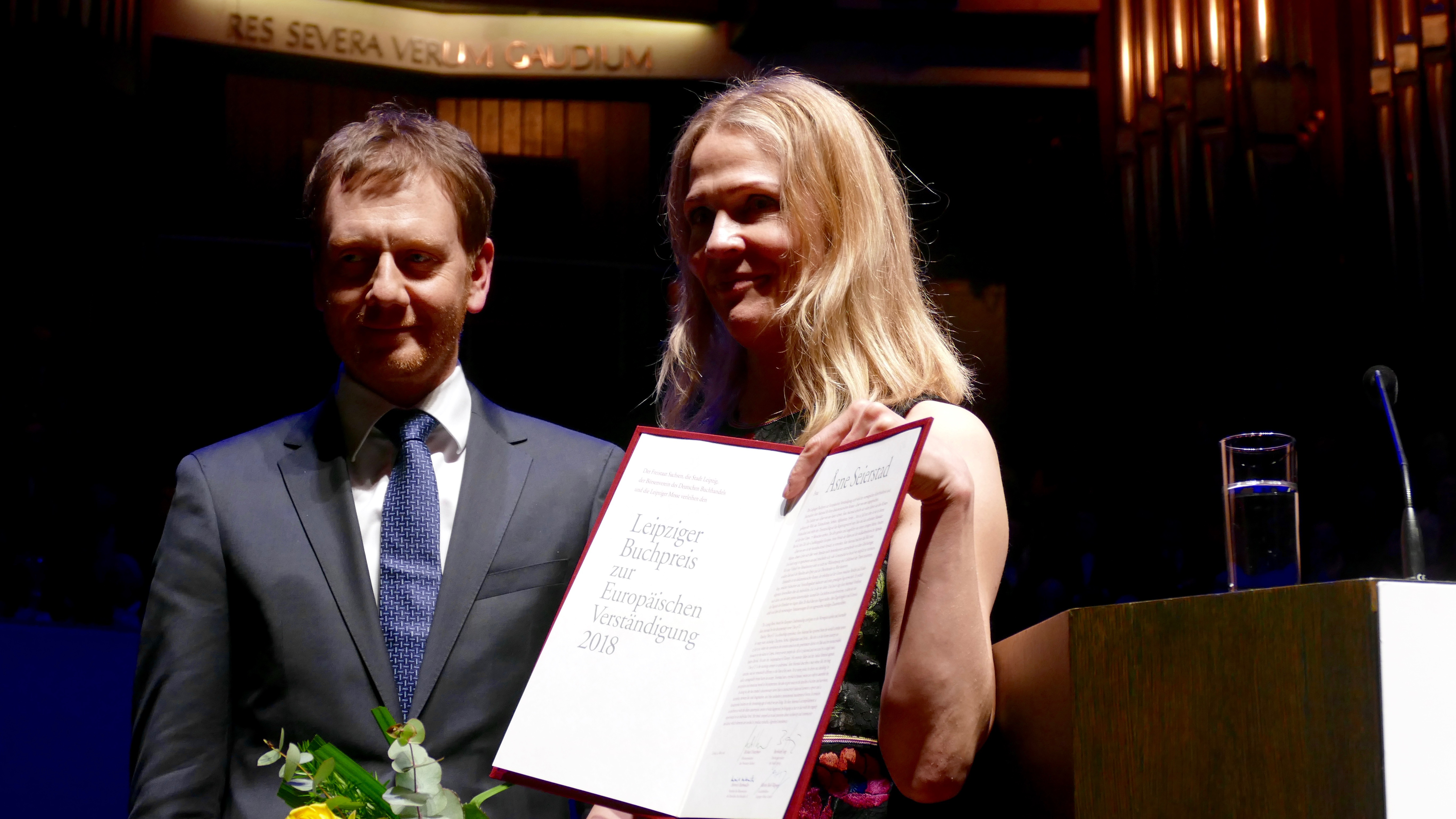 Asne Seierstad erhält den Leipziger Buchpreis zur Europäischen Verständigung 2018 aus den Händen von Michael Kretschmer, Ministerpräsident des Freistaats Sachsen.